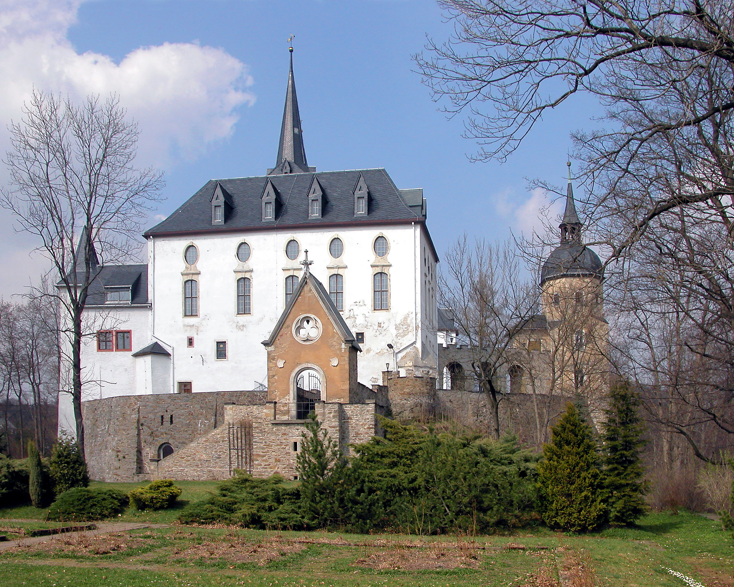 17.04.2004 09544 Neuhausen, Purschenstein 1 (GMP: 50.676317,13.463421): Schloß Purschenstein. Im Wesentlichen 14. bis 16. Jh., 1643 durch Brand schwer beschädigt. Von der urspr. Anlage erhalten: Nördlicher Rundturm, südlicher Rundturm, südlicher Treppen- und Kapellenturm. Im Westflügel reicher Barocksaal Mitte 18. Jh. In d. DDR diente das Schloss als Parteischule, Kinderheim und Klubhaus der Gewerkschaften. 1989 brach ein Brand aus, der Teile des Schlosses zerstörte. Der Adelssitz wurde in alter Form wieder aufgebaut. Südflügel mit Schloßkapelle. [DSCN2776.TIF]20040417230DR.JPG(c)Blobelt